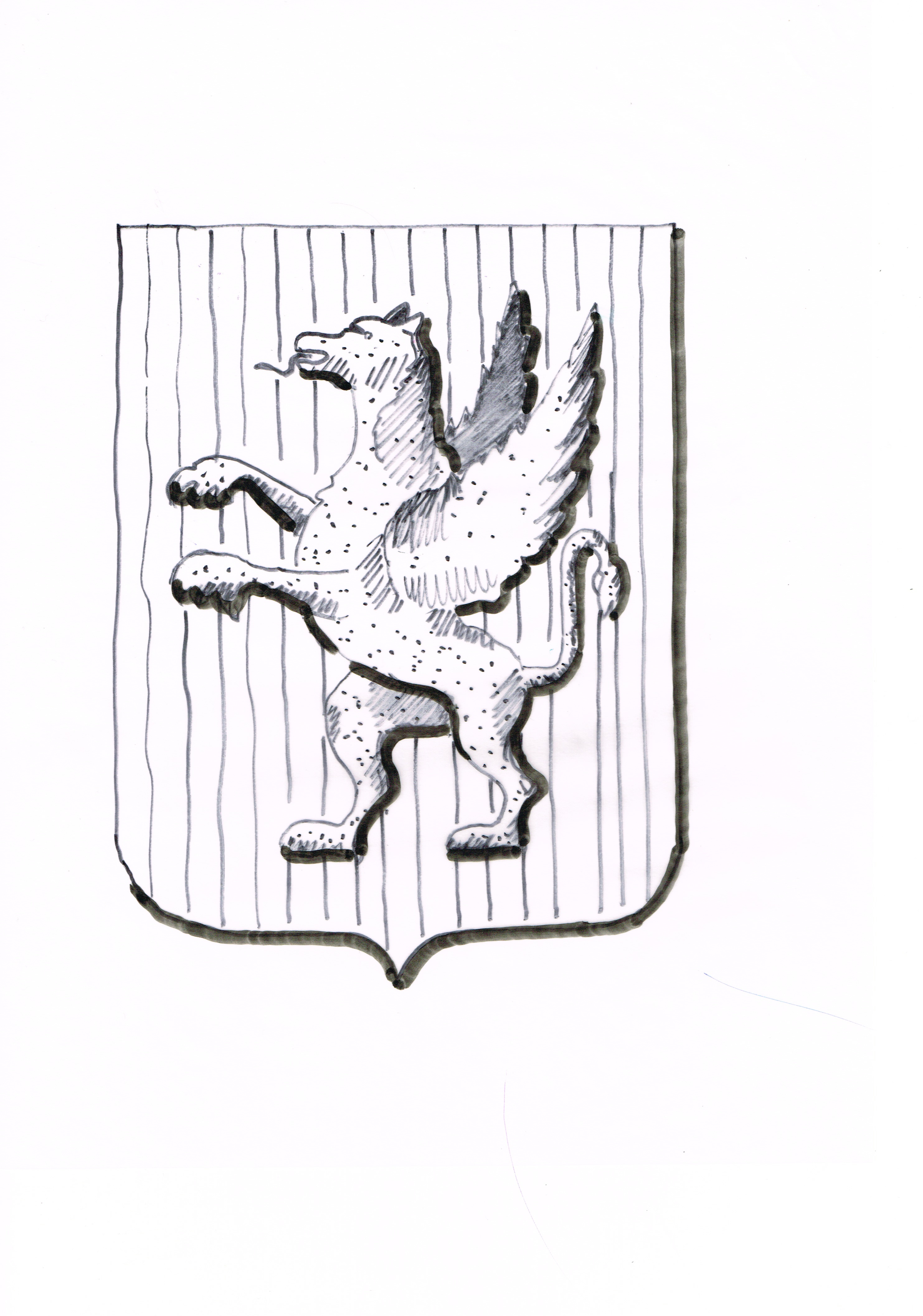 Dessin du blason du château de la Malle à St Brice Courcelles - Marne